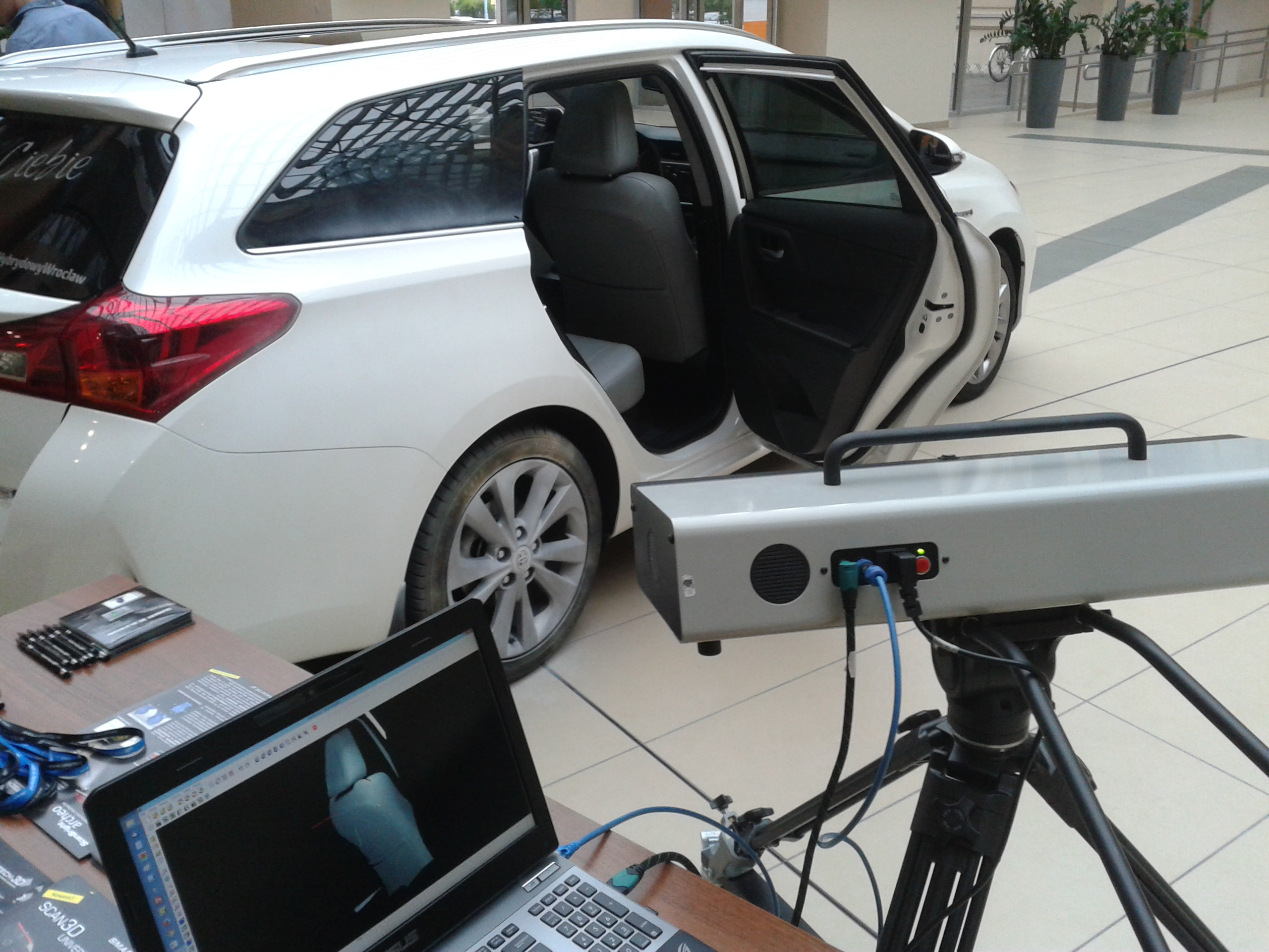 Na obrazku pokazany jest proces skanowania samochodu technologią skanowania 3D.